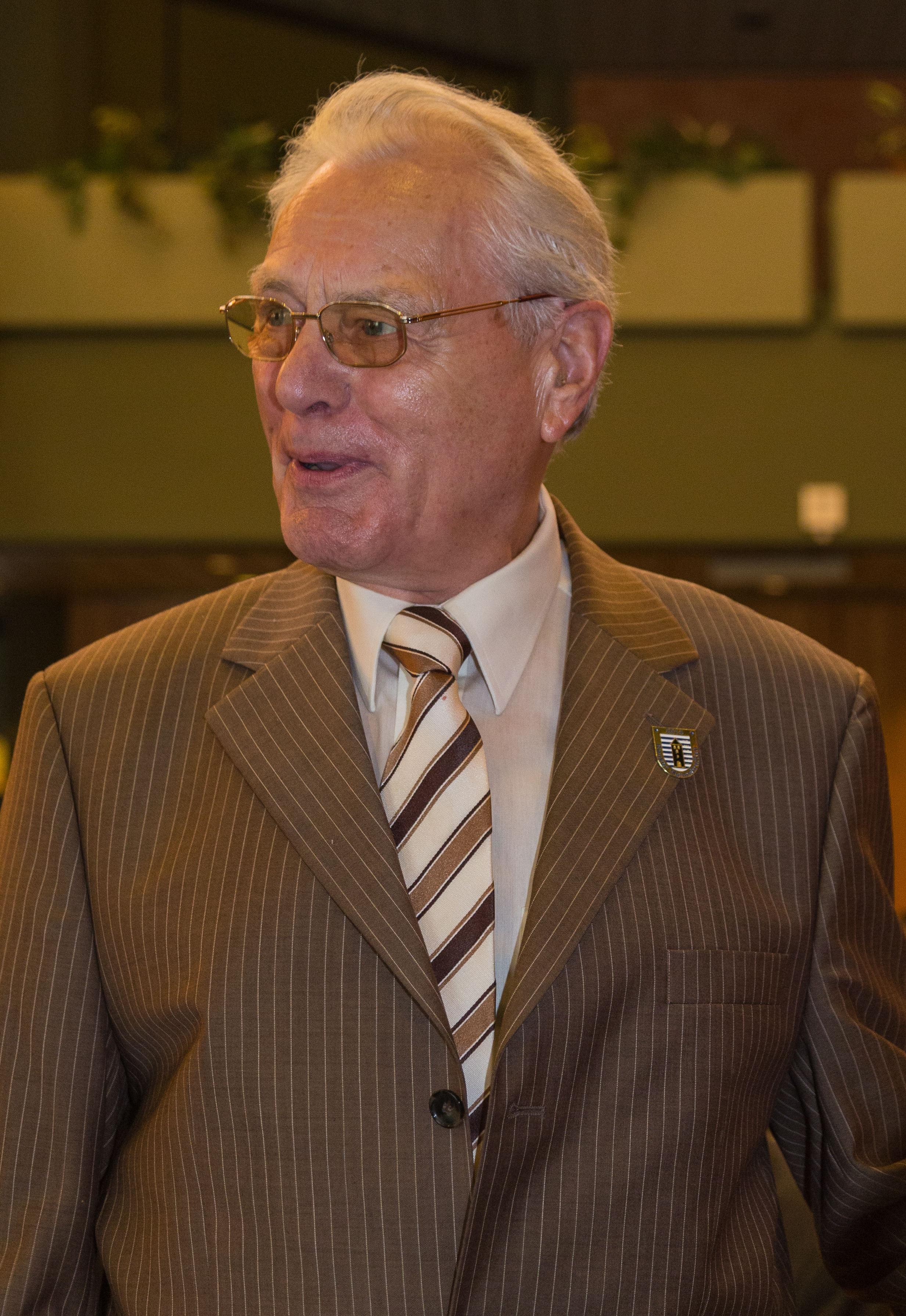 Festakt des 14. Recker Heimattreffens im Bürgersaal des Rathauses von Recke, Kreis Steinfurt, Nordrhein-Westfalen, Deutschland. Das Heimattreffen war integraler Bestandteil der 825-Jahr-Feier der Gemeinde Recke. Hier Altbürgermeister und -landrat Martin Stroot, einr der Vorsitzenden des Heimatvereins Recke.